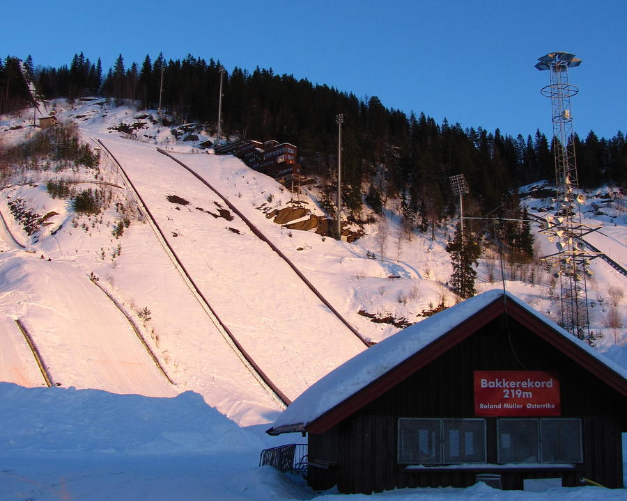 K185 i Vikersund Hoppsenter. Vikersund befinder sig i Modum kommune, Buskerud fylke, Norge